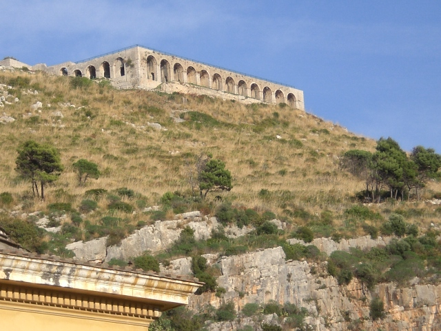 Tempio di Giove Anxur visto da piazza Garibaldi a Terracina